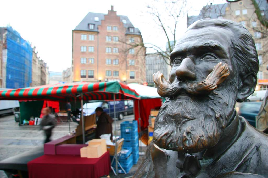 Az egykori brüsszeli polgármester, Charles Buls szobra a Grasmarkt-on, Henri Lenaerts (1923–2006) alkotása